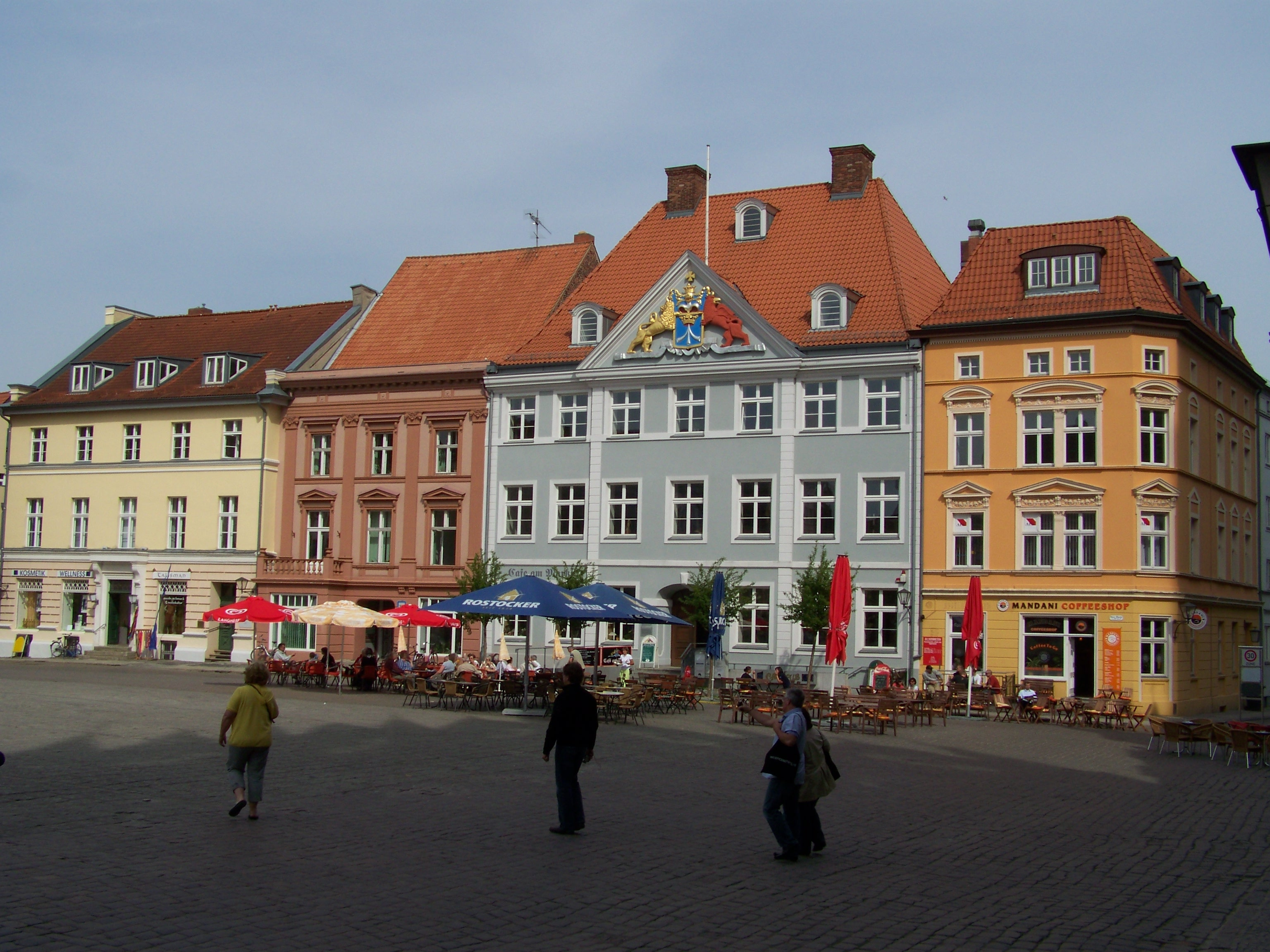 Alter Markt (Stralsund), Ostseite, 2009-04-xx